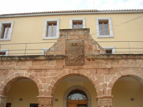 Monasterio de Vico, situado cerca de Arnedo